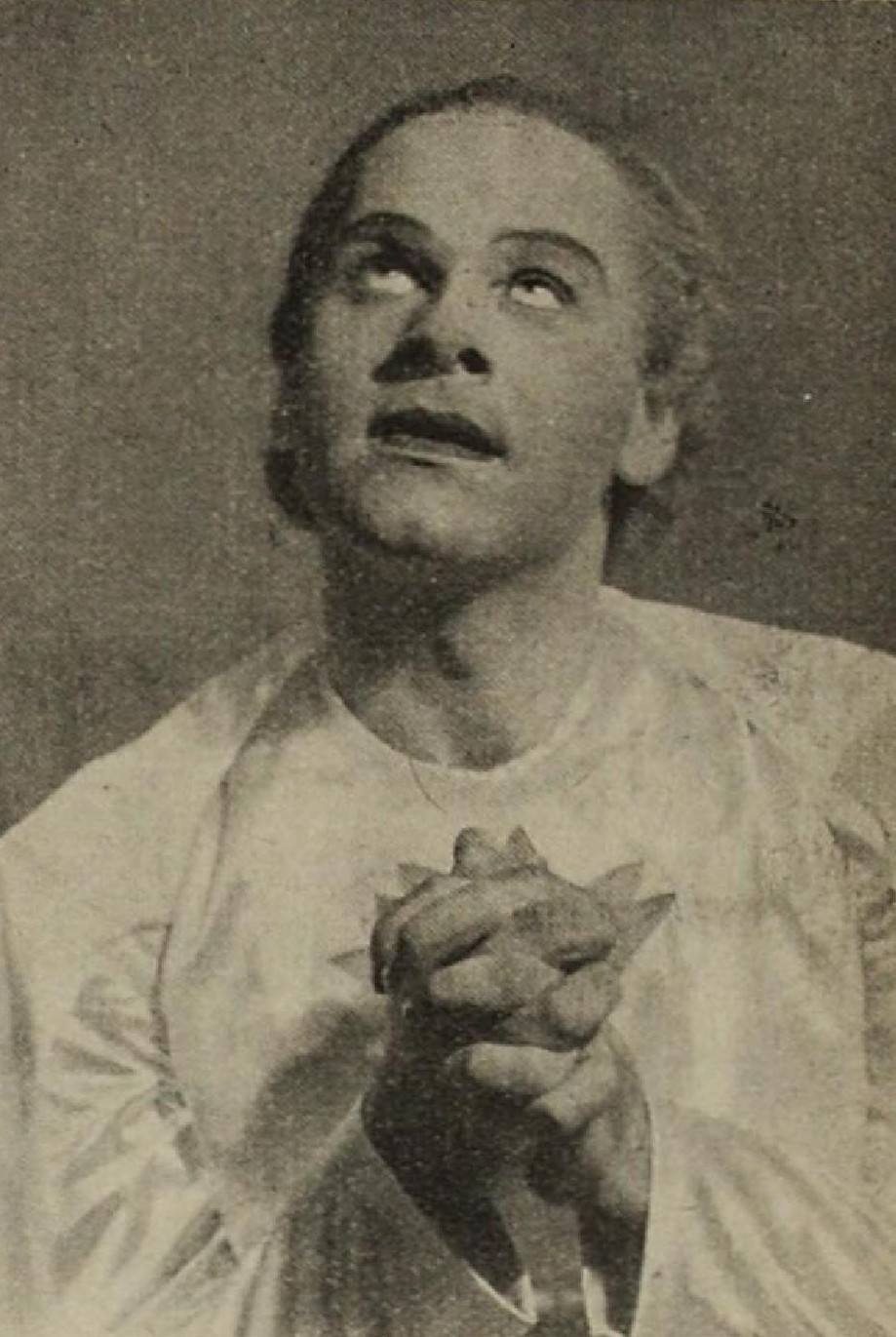 Vítězslav Vejražka (1915-1973), český herec, divadelní režisér, divadelní pedagog a politik